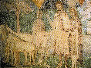 Пржемысл Пахарь, легендарный первый князь чехов